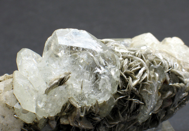 Beryl goshenit, muskowit, skaleń Chiny, autor zdjęcia Stowarzyszenie Spirifer, 25.10.2006 r.